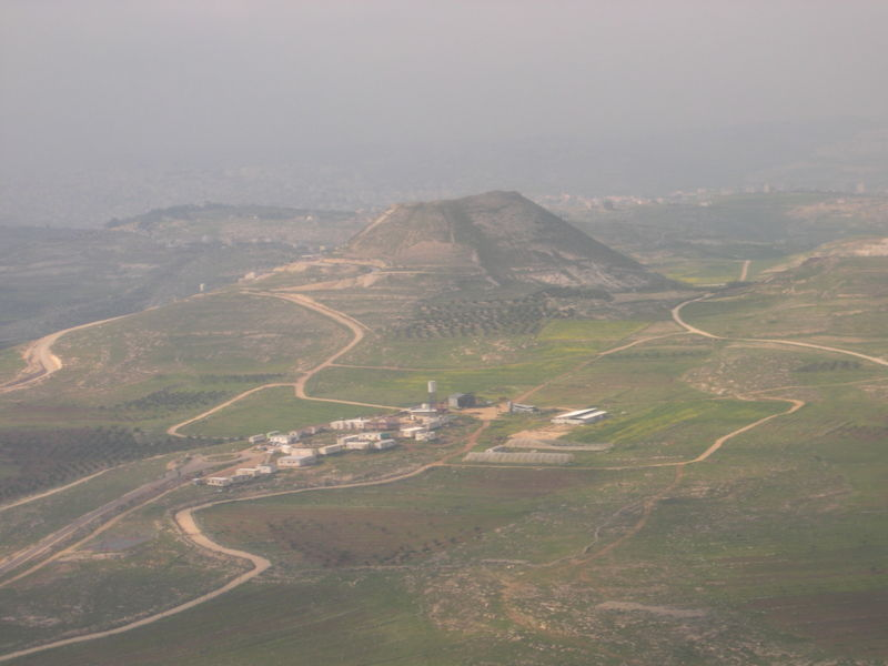 מבצר הhe:הרודיון כפי שנראה מדרום. צולם והועלה על ידי אסף.צ בhe:15 במרץ he:2005.